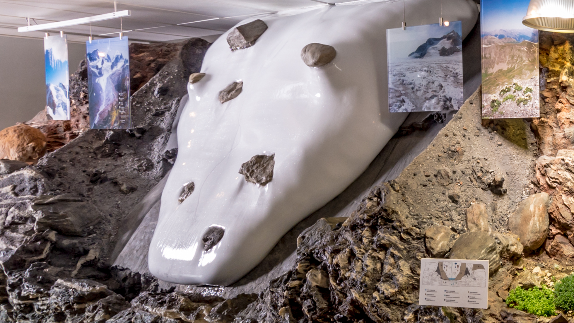 Ricostruzione della lingua di ghiaccio di un ghiacciaio al quarto piano del MUSE. Lato destro.